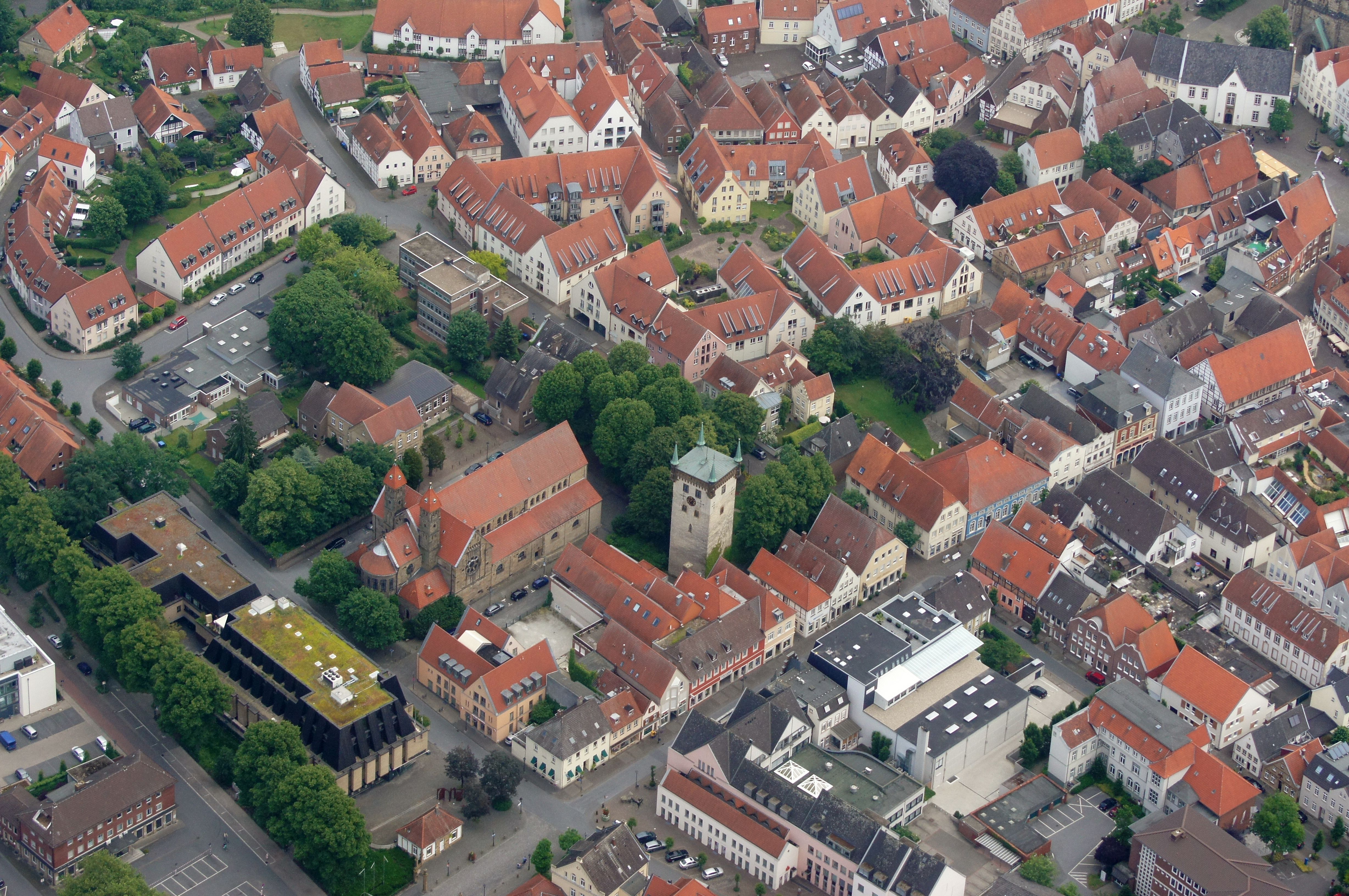 Gotischer Turm der alten Marienkirche in Warendorf, Nordrhein-Westfalen, Deutschland. Daneben die neue Marienkirche. Die Aufnahme entstand während des Münsterland-Fotoflugs am 1. Juni 2014. Hinweis: Die Aufnahme wurde aus dem Flugzeug durch eine Glasscheibe hindurch fotografiert.